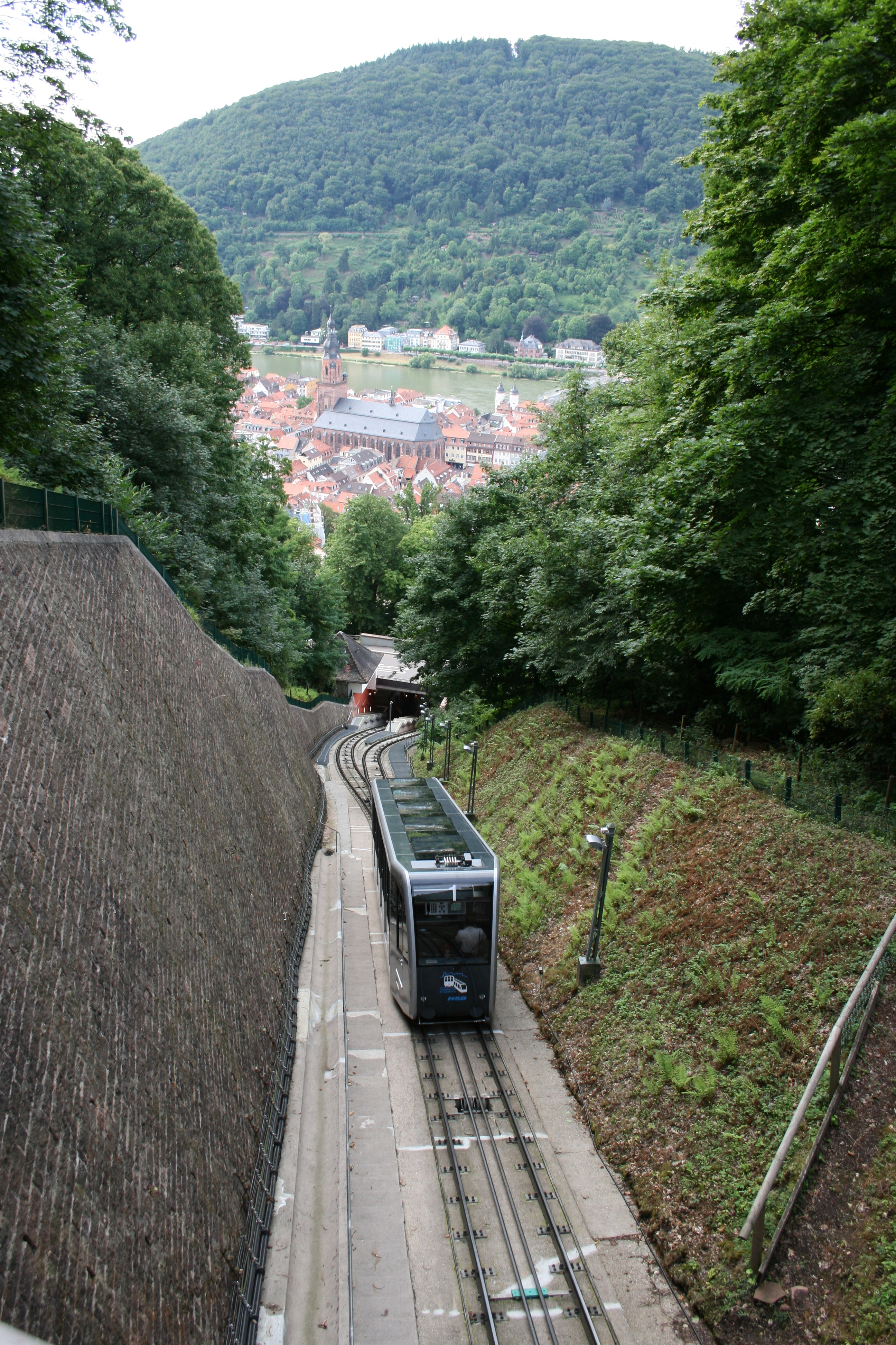 Heidelberg, untere Bergbahn vor der Einfahrt in die Station Heidelberger Schloss. Im Hintergrund die Heidelberger Altstadt und der Heiligenberg.